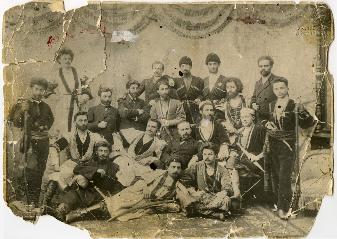 კიევის უნივერსიტეტის ქართველი სტუდენტები. მესამე რიგში მარცხნიდან მეოთხე შიო ჩიტაძე, მეორე რიგში შუაში ზის მელიტონ ბალანჩივაძე, პირველ რიგში შუაში გიორგი ჭოღოშვილი. გიორგი ჭოღოშვილი - ექიმი. მელიტონ ბალანჩივაძე - კომპოზიტორი, ქართული საოპერო მუსიკის ფუძემდებელი. შიო ჩიტაძე - ფილოლოგი, ისტორიკოსი და პედაგოგი.